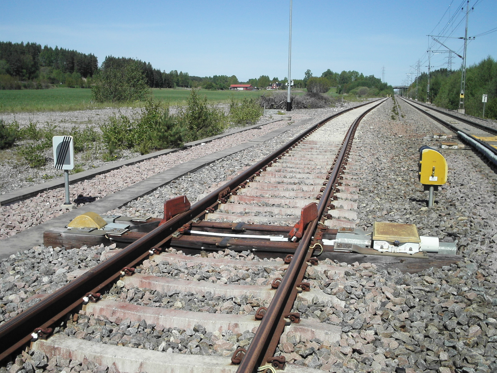 Stoppblock